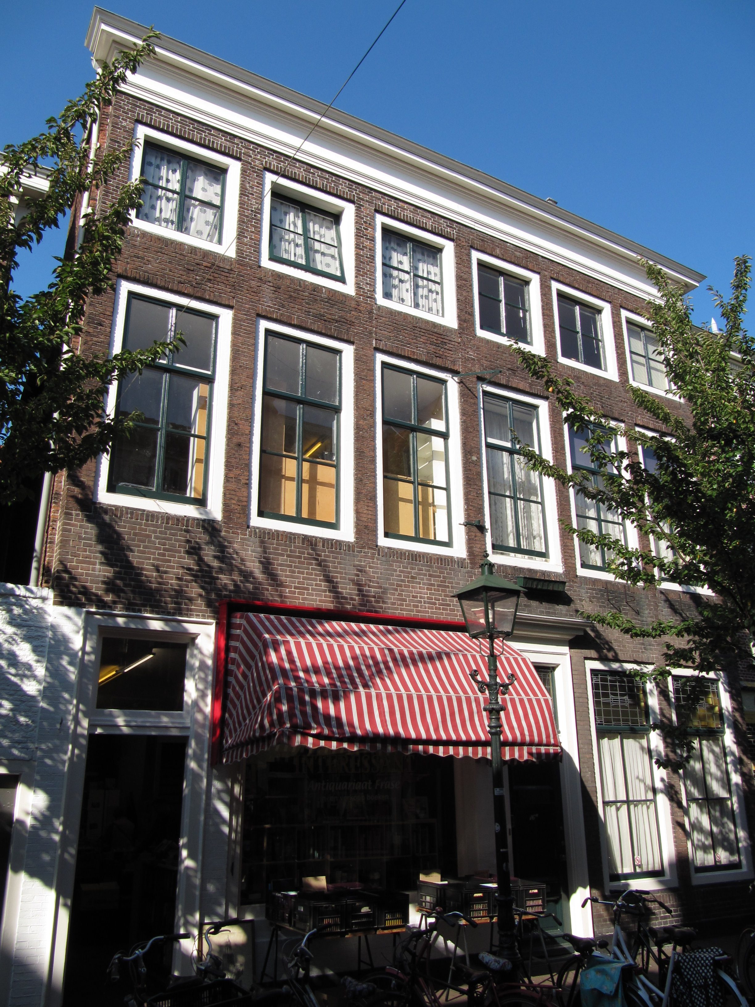 Delft, Choorstraat 16